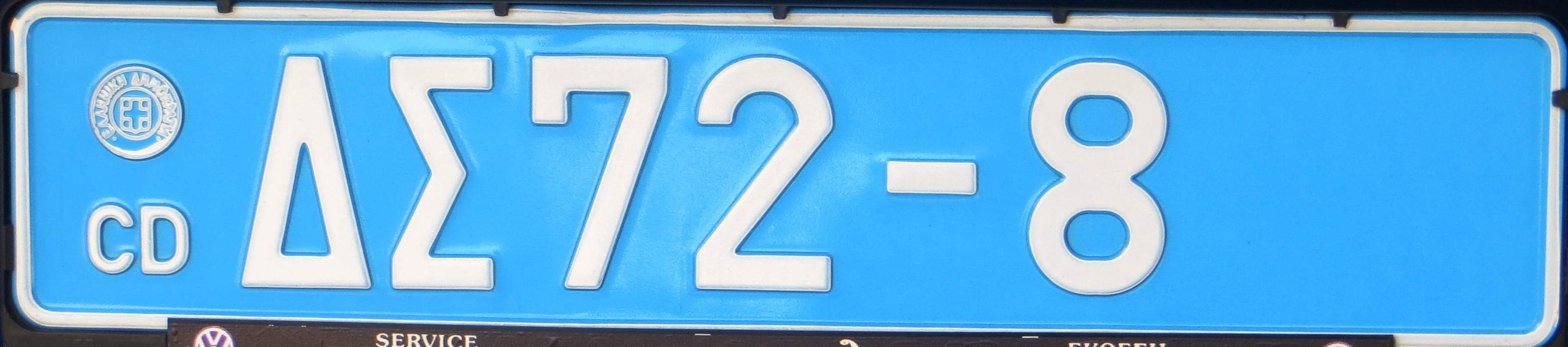 CD kentekenplaat Griekenland